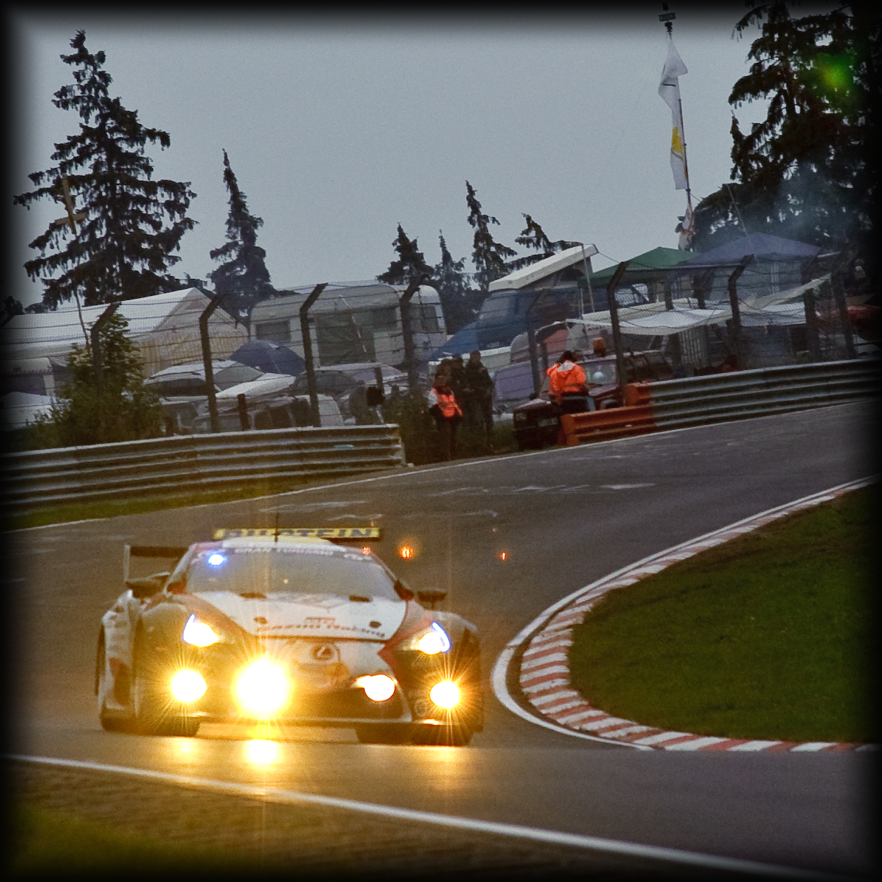 Gänsehaut pur an dieser Stelle, wenn die Boliden auf Augenhöhe in Meterabstand ans Limit gehen.